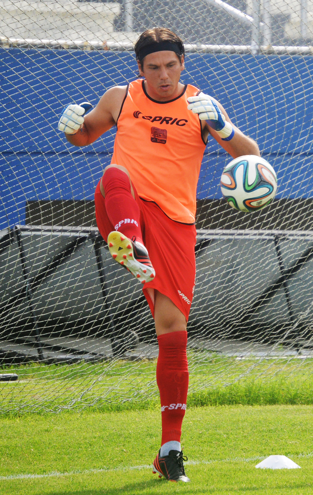 Paolo Ortiz con la camisa del Delfín SC de Ecuador